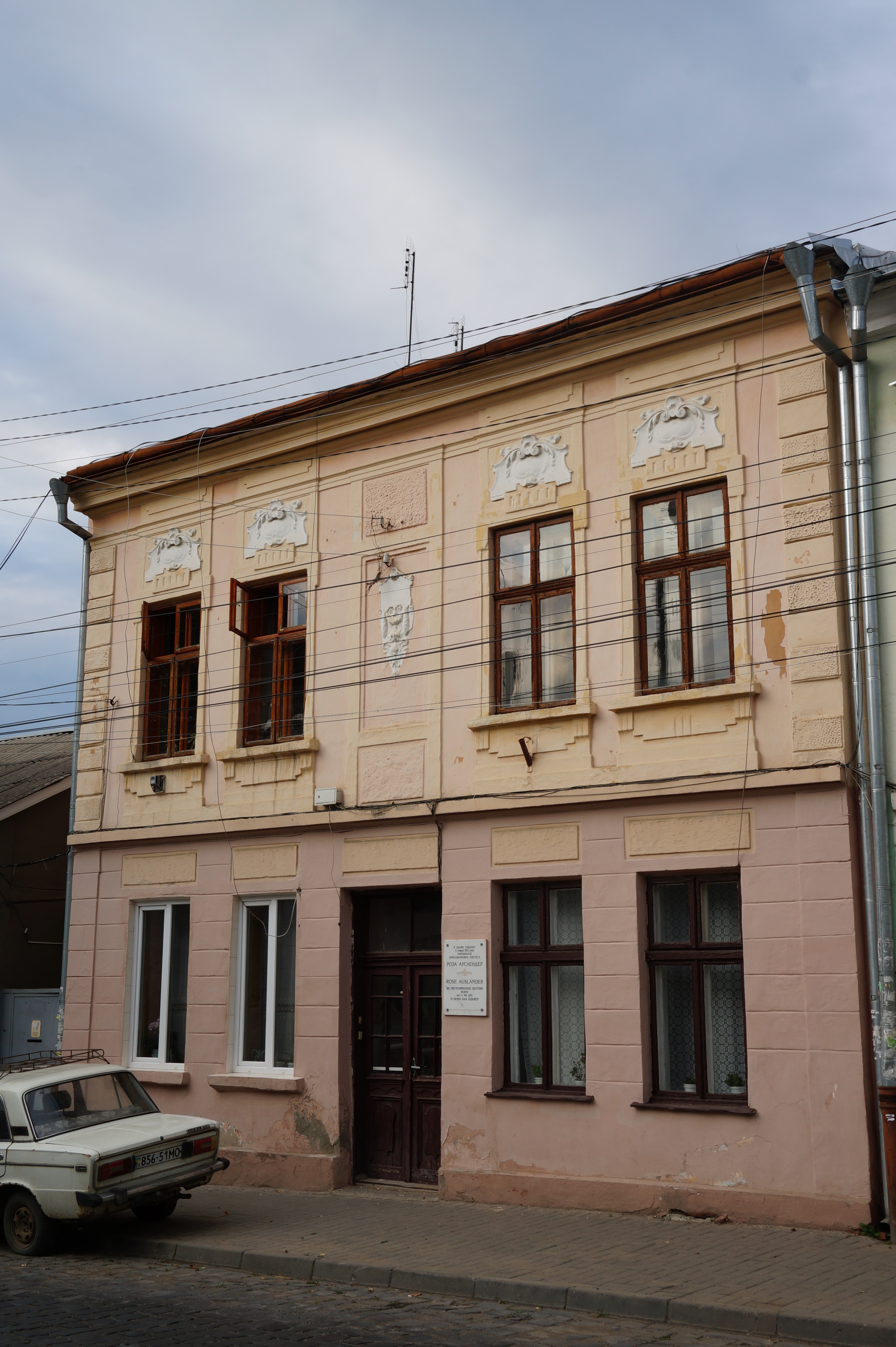 Будинок, в якому народилася Ауслендер Роза (1901 - 1988) – єврейська німецькомовна поетеса, Чернівці, вул. П. Сагайдачного, 57